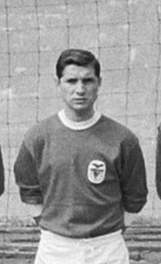 Fernando Cruz con el Benfica en 1965